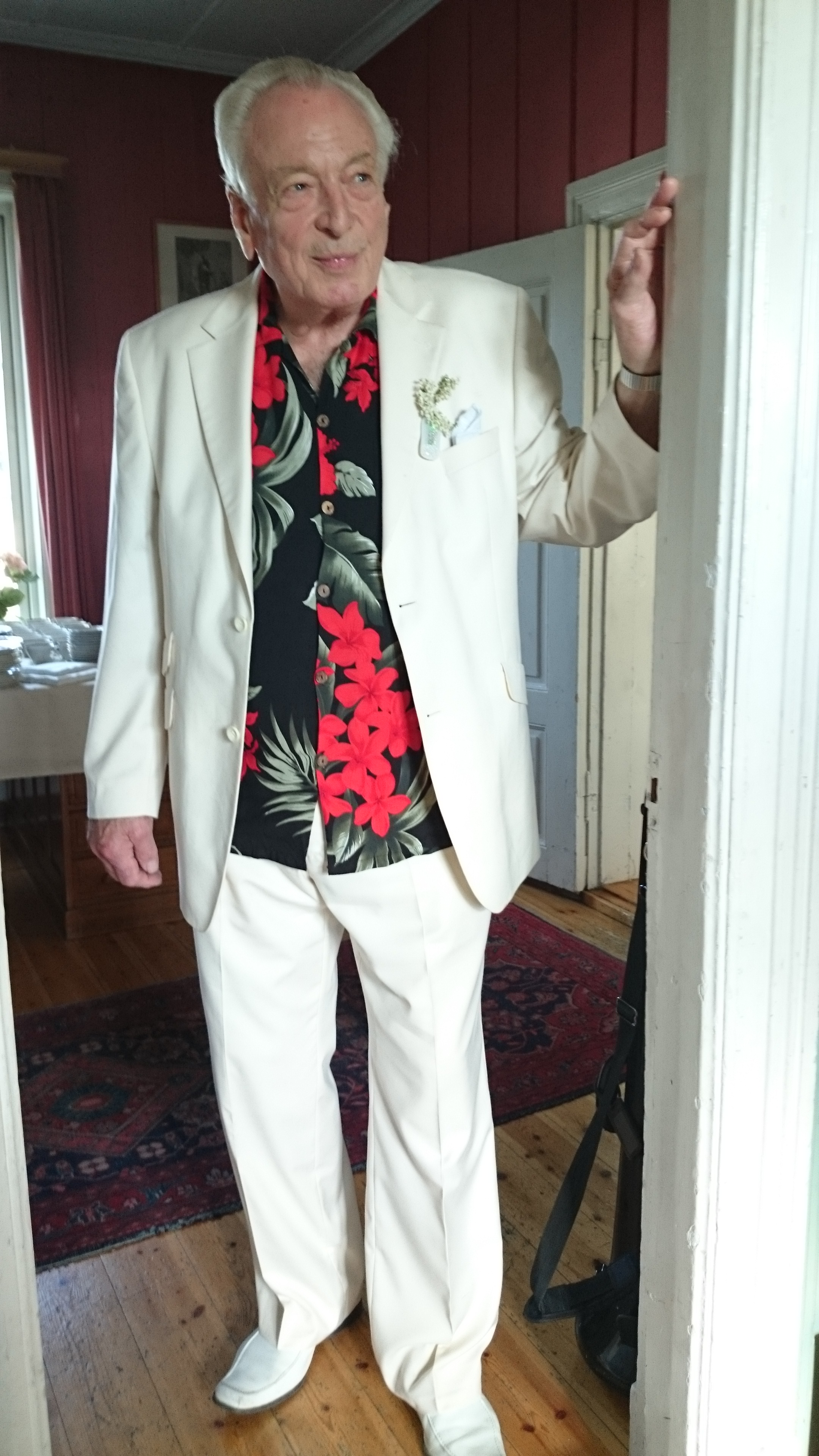 Fra 80 års fering 2014